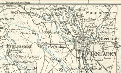 Aartalbahn bei Wiesbaden